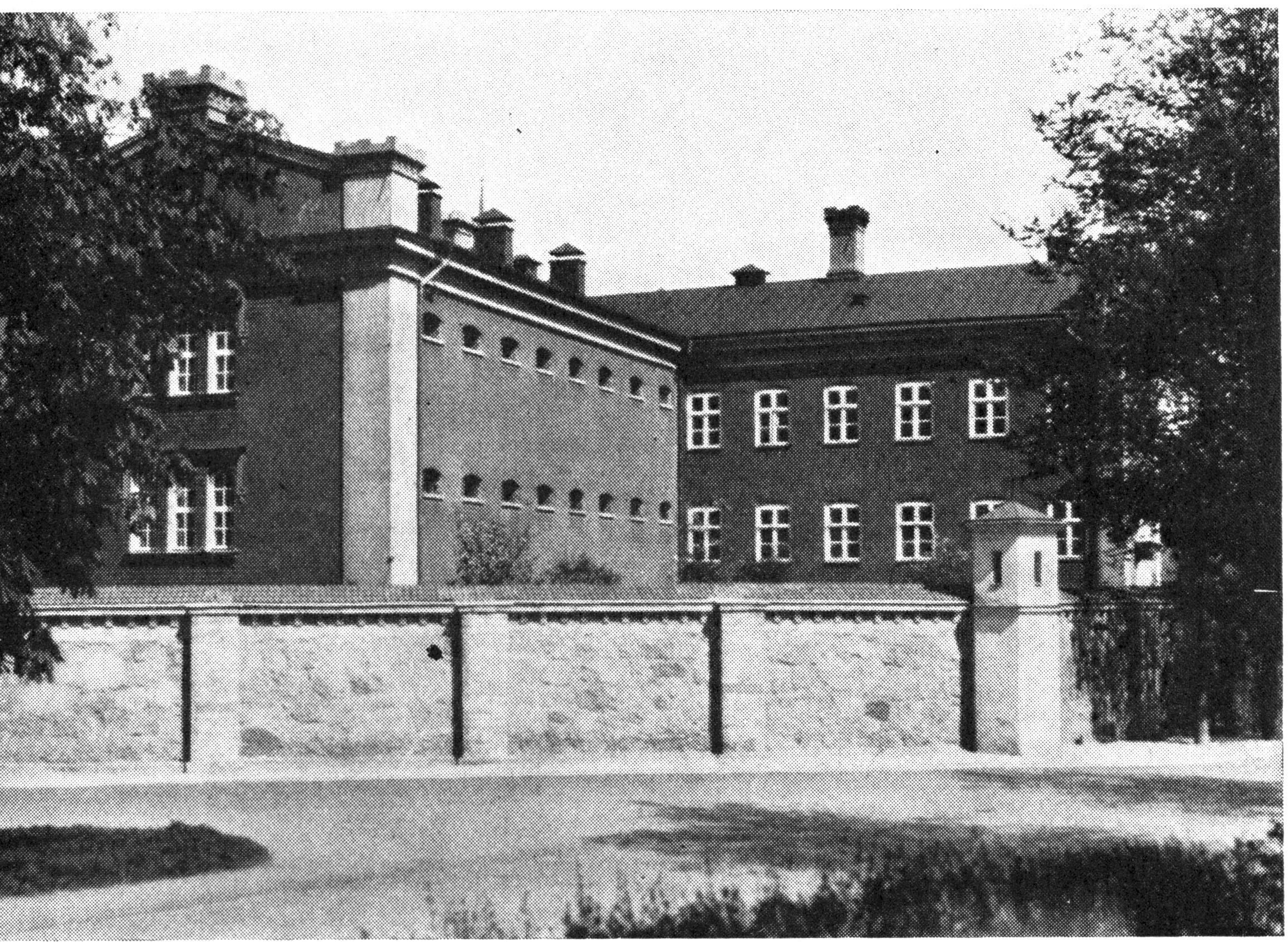 Länsfängelset i Linköping